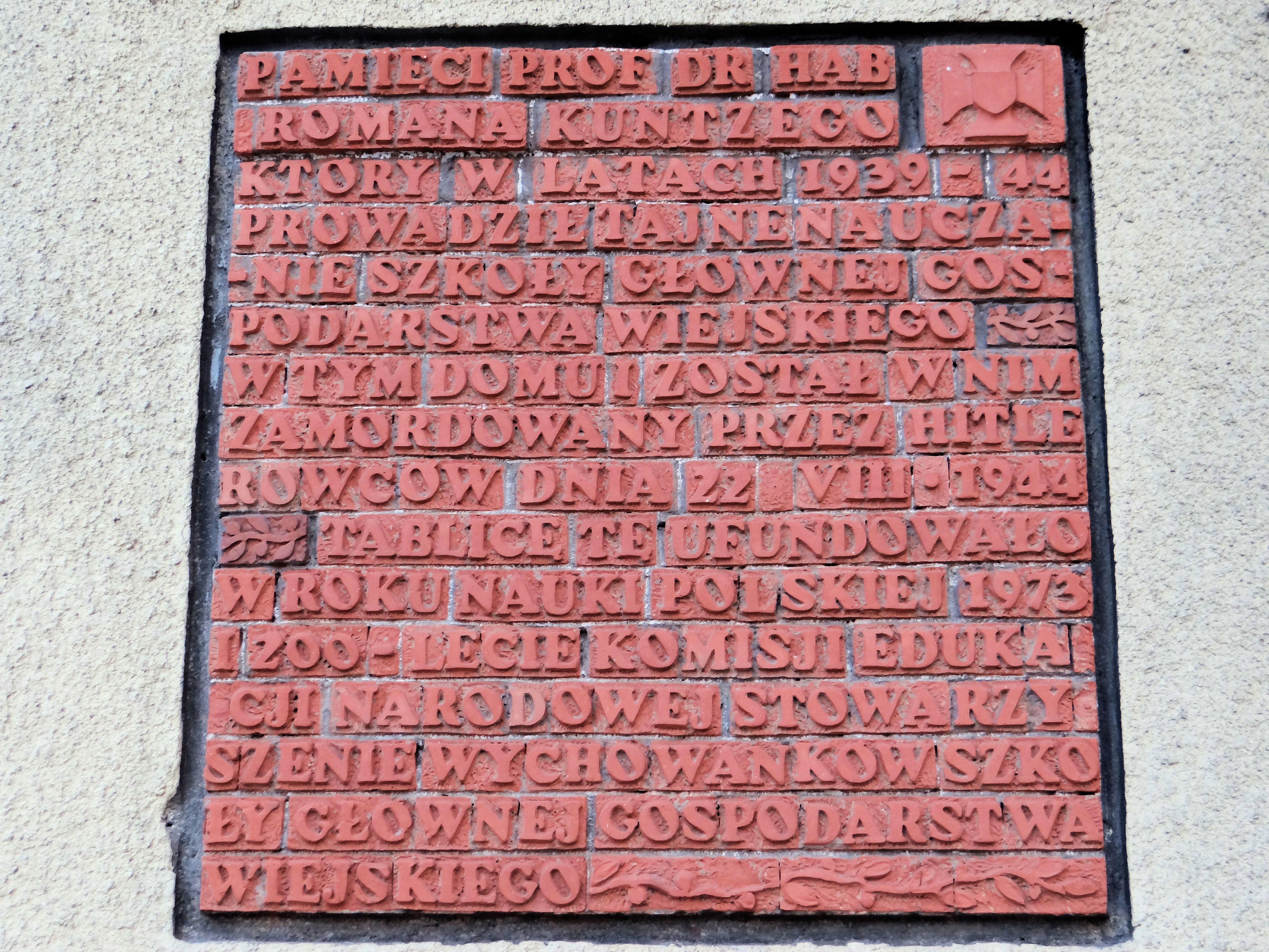 Tablica poświęcona pamieci profesora dr hab Romana Kuntzego prowadzącego w latach 1939 - 1944 tajne nauczanie SGGW - na budynku w którym prowadził tajne komplety i w którym został zamordowany. U zbiegu ulic Kazimierzowskiej i Madalińskiego w Warszawie.